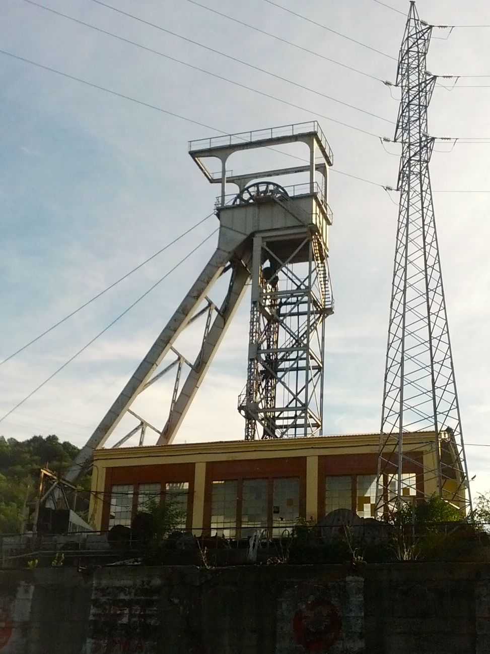 Castillete del pozo Lláscares, en Langreo (Asturias, España)